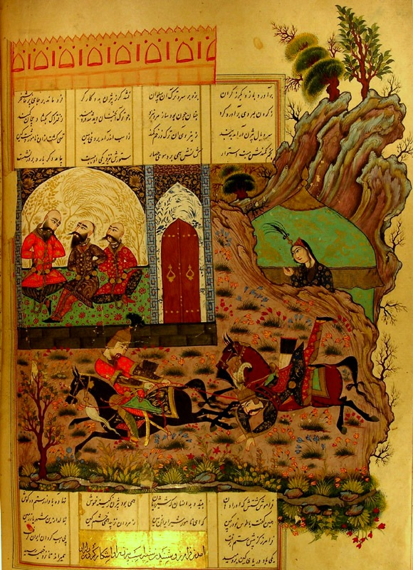 Сцена из Бурзанаме Тюркский воин захватывает Бижана